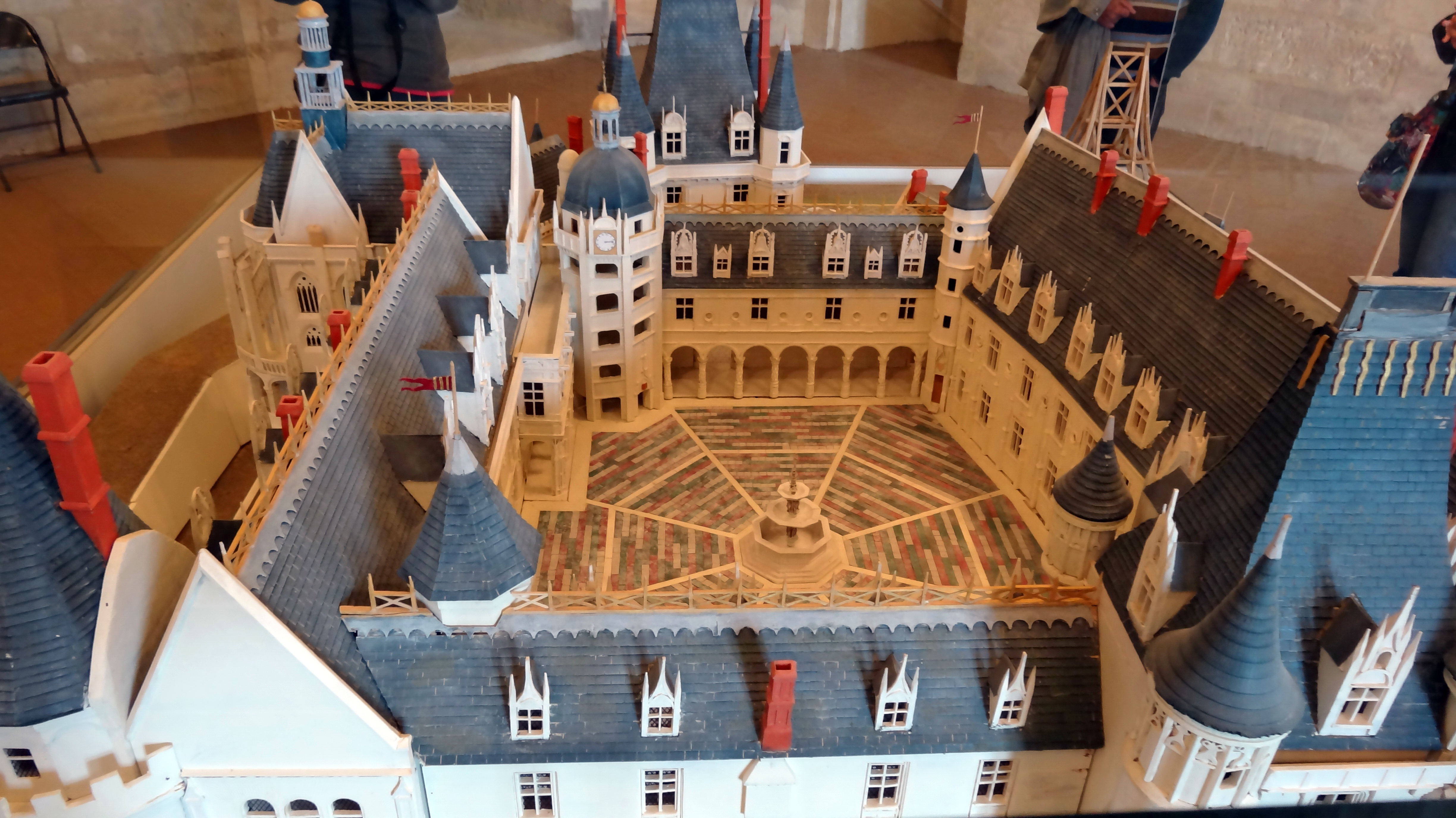 Maquette du château de Gaillon - Cour d'honneur (Normandie)